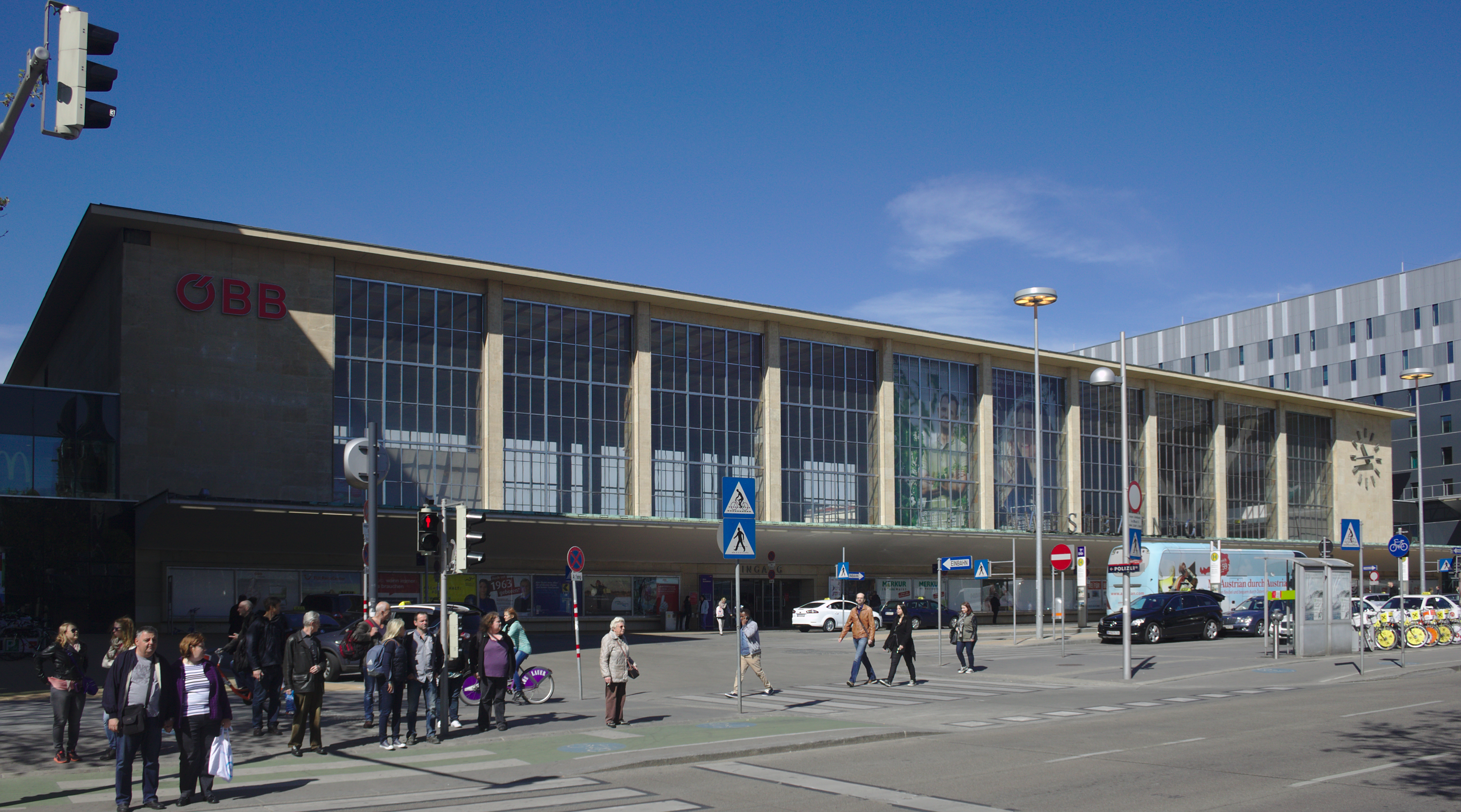 Westbahnhof